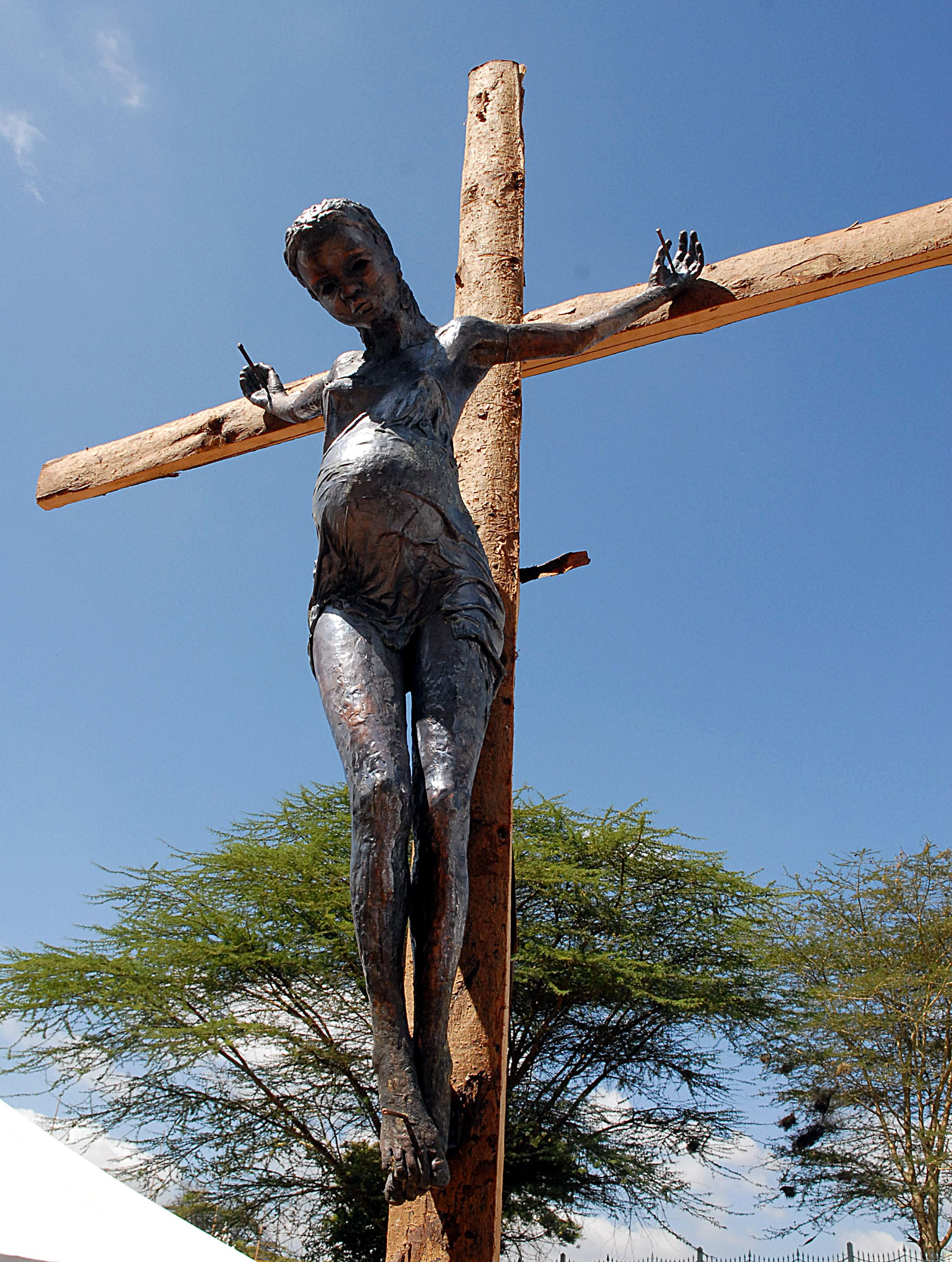 Nairóbi (Quênia) - Obra do artista dinarmaquês Jens Galschiot, que veio expor sua arte no 7º Fórum Social Mundial, em Nairóbi, para denunciar o "fundamentalismo cristão, protestante e muçulmano que inibe a difusão de informações sobre o planejamento familiar".